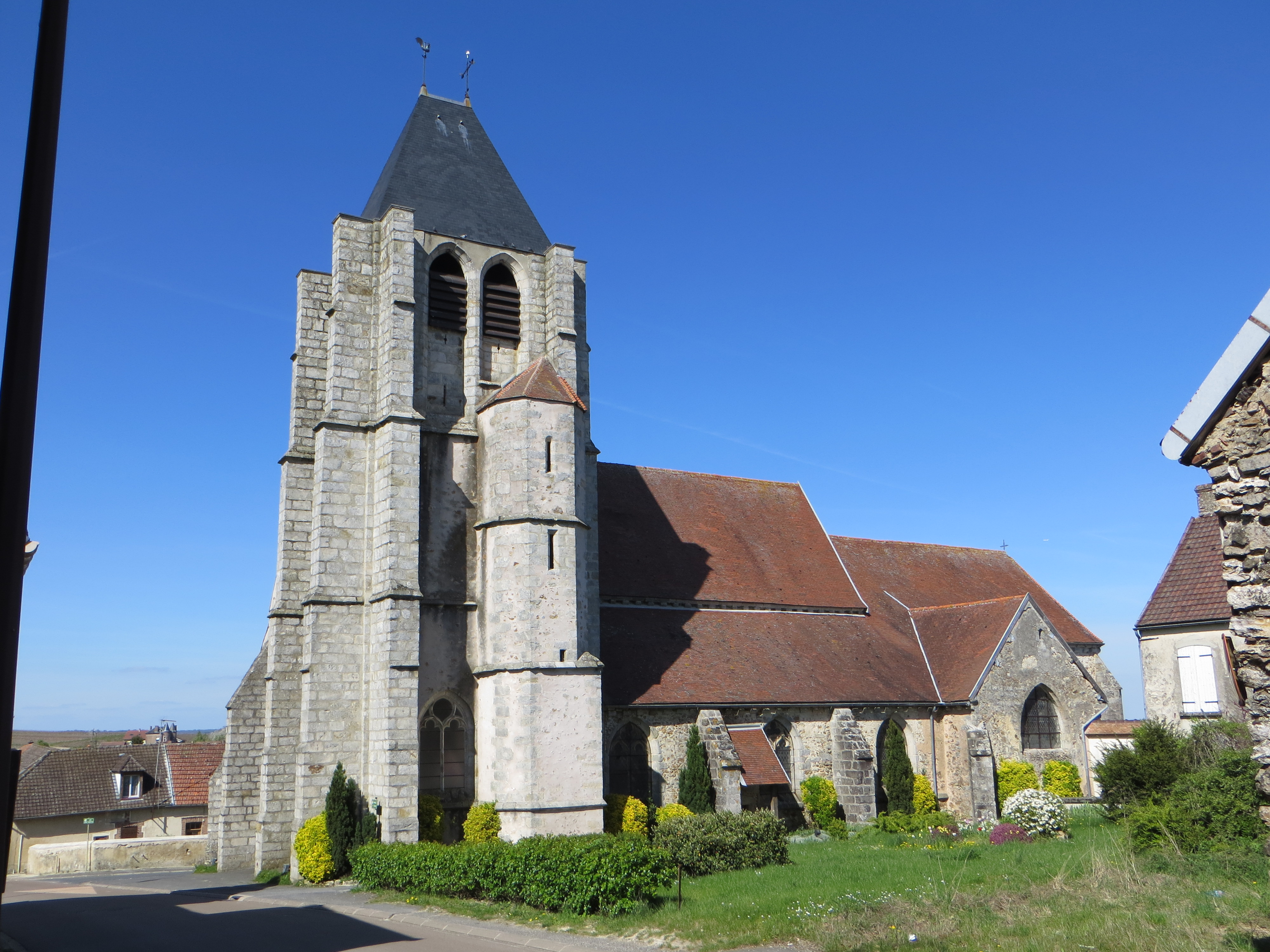 Vue générale de l'église